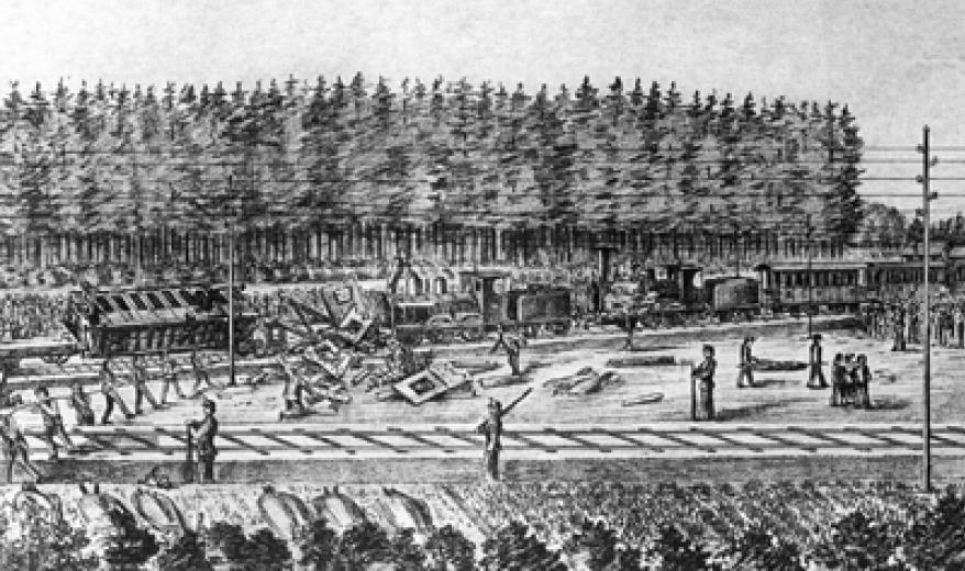 Im August 1891 wurde in Bern das 700-Jahr-Jubiläum der Stadtgründung gefeiert, was Hunderttausende Besucher anlockte. Am 17. August 1891 fuhr ein Schnellzug auf der Linie Biel–Bern kurz vor der Station Zollikofen mit voller Wucht in einen auf die Weiterfahrt wartenden Sonderzug. Die Lokomotive des Pariser Expresszuges zertrümmerte die beiden letzten Wagen des mit Festbesuchern besetzten Zuges. 17 Personen wurden getötet.